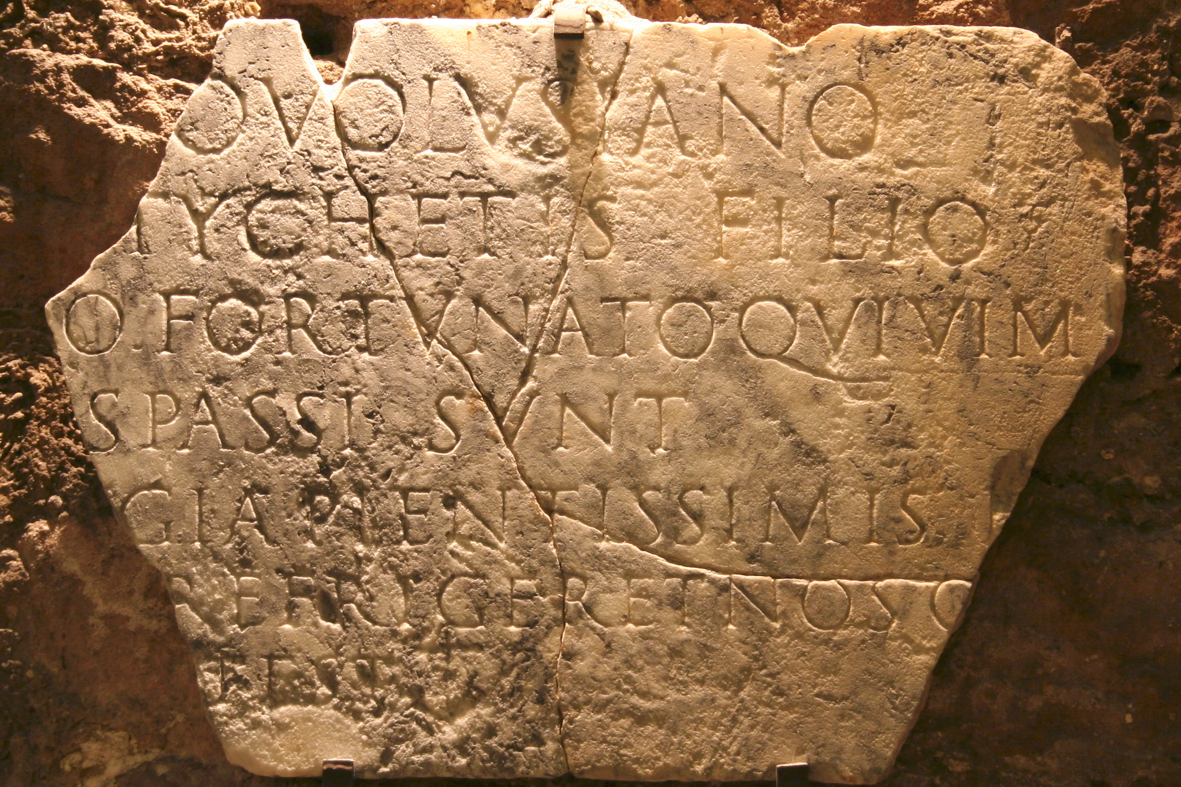 Epitaphe de Volusien et Fortunat se trouvant dans les cryptes de l'abbaye de Saint-Victor à Marseille.